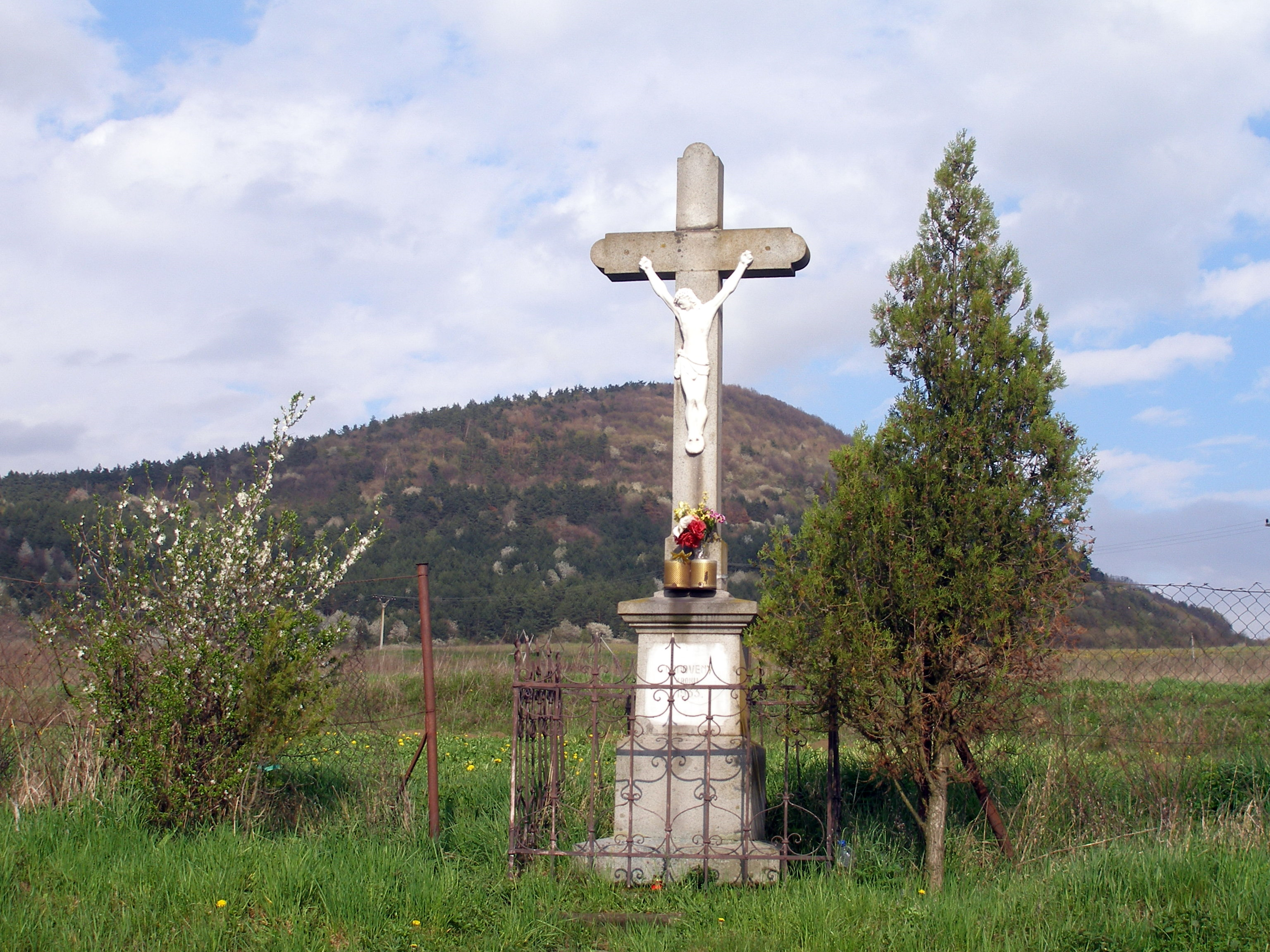 Obec Brestov okres Prešov, región Šariš